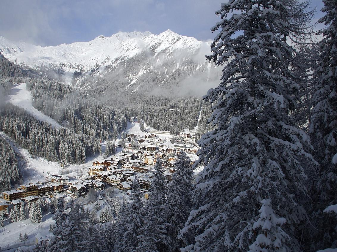 madonna di campiglio vista da spinale